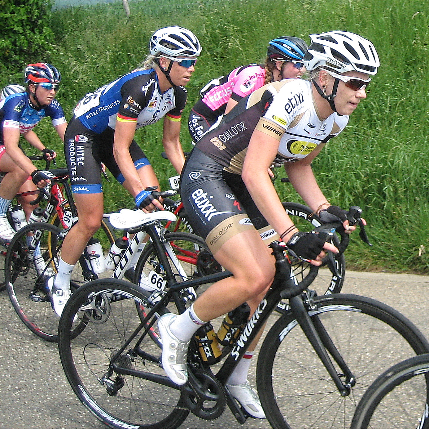 Demmy Druyts (Topsport Vlaanderen) in Holland Hills Classic 2016